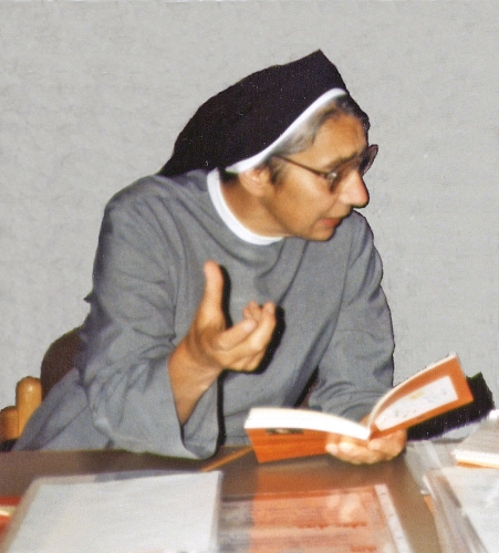 Sr. Liliane Juchli, Zürich